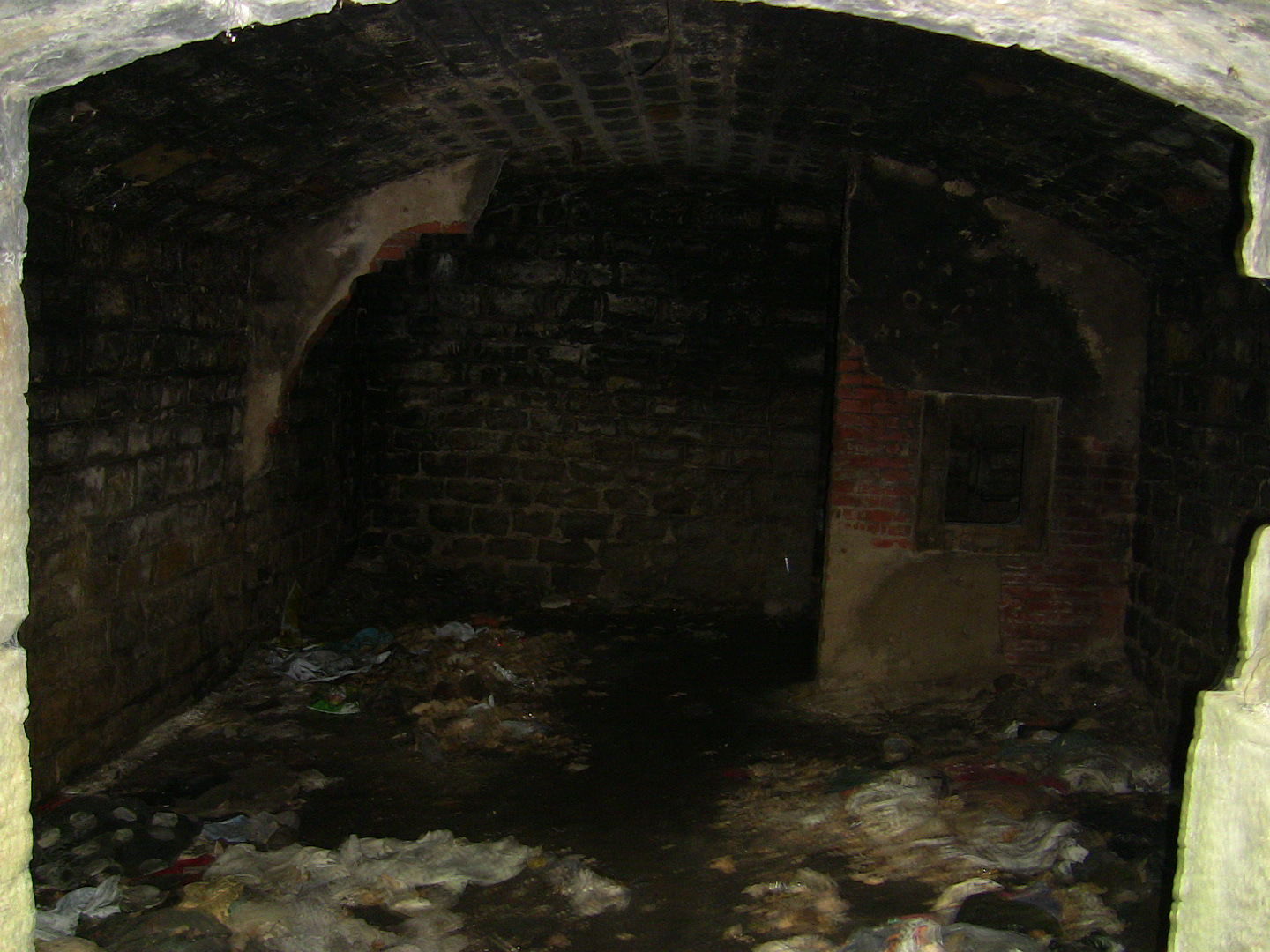 Chambre III de la batterie de mortiers du fort de Planoise, à Besançon (Doubs, France).